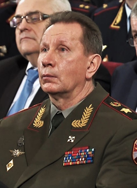 Генерал армии Виктор Золотов на расширенном заседании Коллегии МВД, 15 марта 2016 года.